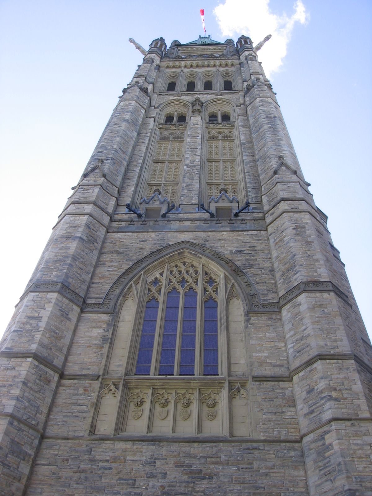 Tour de la Paix, édifice du Centre du Parlement du Canada - Peace Tower, Centre Block of the Parliament of Canada